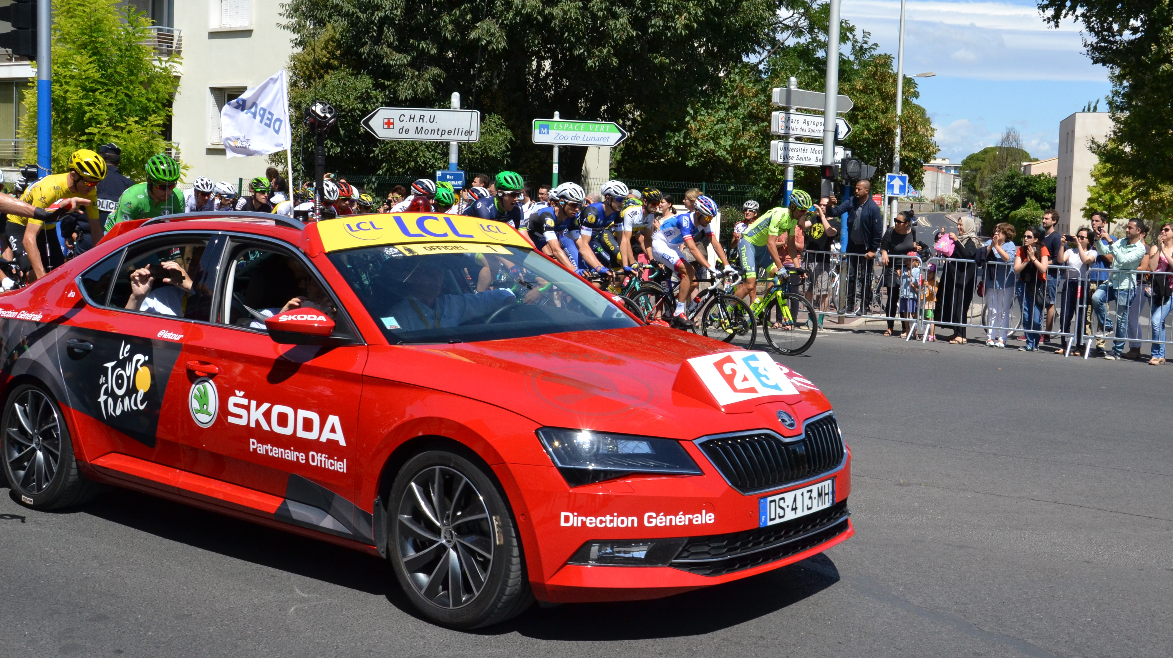 12e étape du Tour de France 2016. Le peloton quitte Montpellier avant le départ réel.